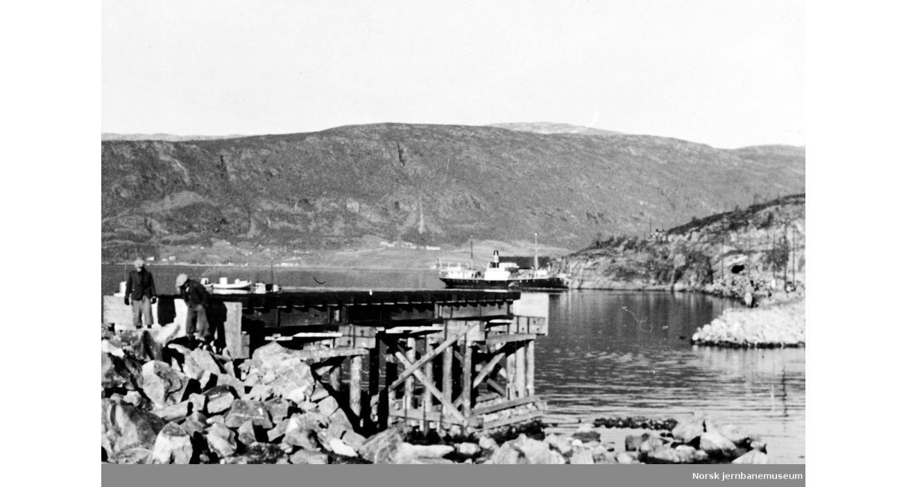 Her bygges jernbanen på en fylling over Fallbukta (Faillboktæ) mellom Lindset og Holandsvika. Fjellkanusen der båten ligger til kai, er Holandshaugen (Holandshåjen)